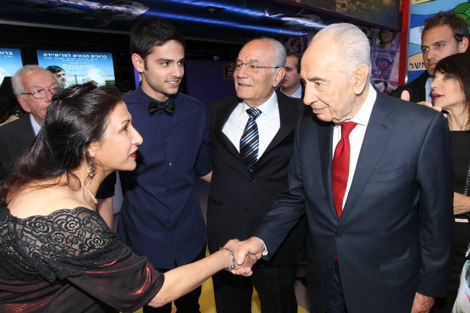 אהובה קרן עם הנשיא שמעון פרס בבכורה של הסרט "מפריח היונים" ב-2014.